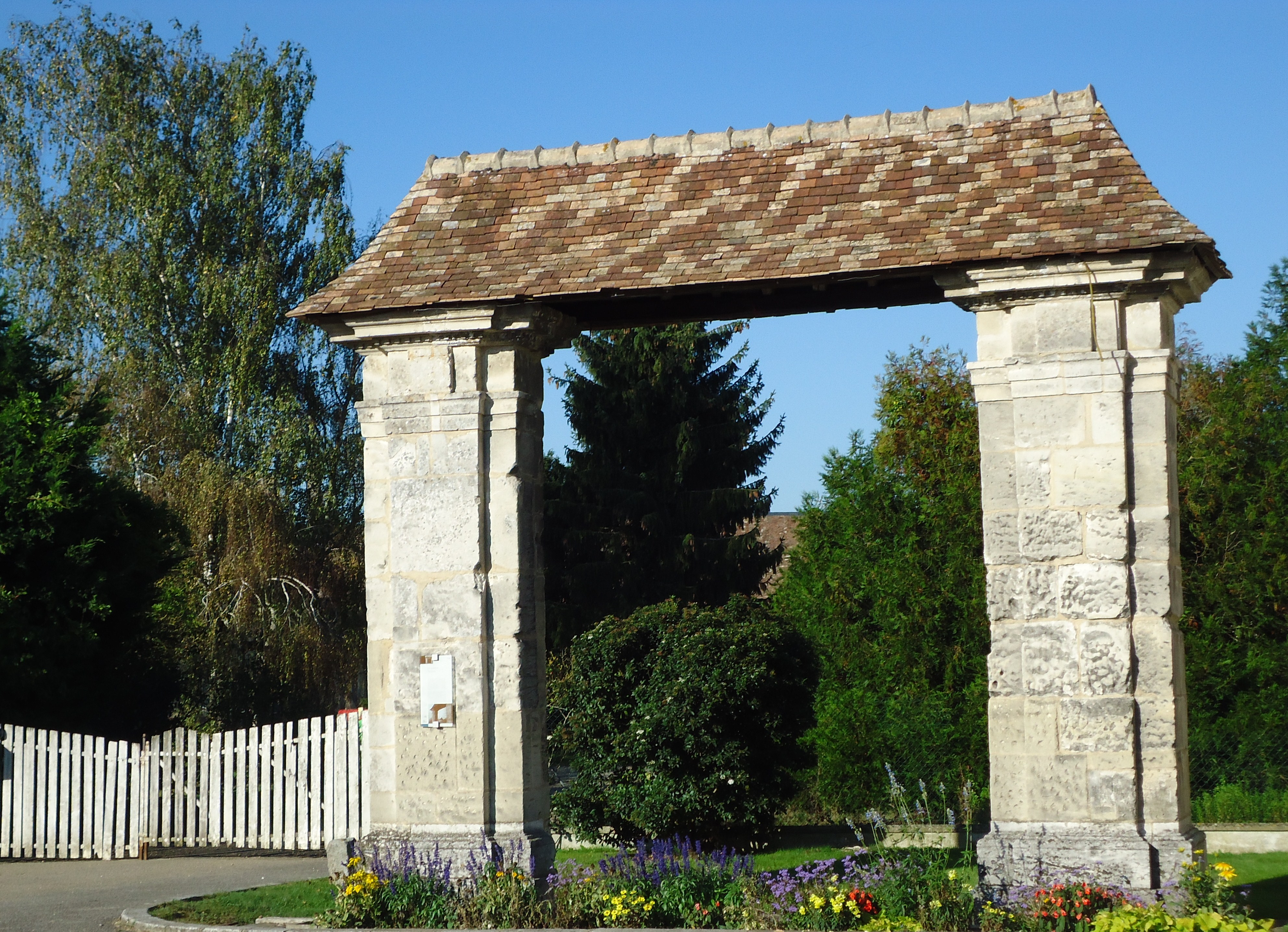 Porche du XVIIIe symbolisant l'entrée de la ferme de l'Abbaye Sainte-Cécile